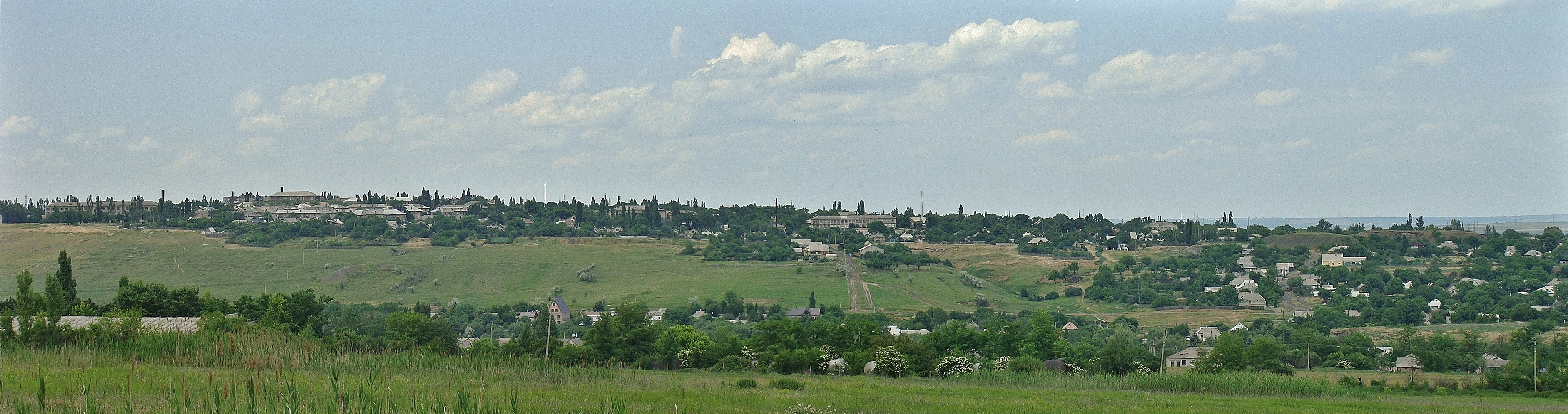 Вид на Нижнею Крынку с юга.